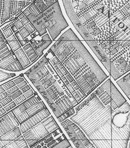 Actuel îlot Saint-Éloi et couvent des Dames de la Trinité en 1760